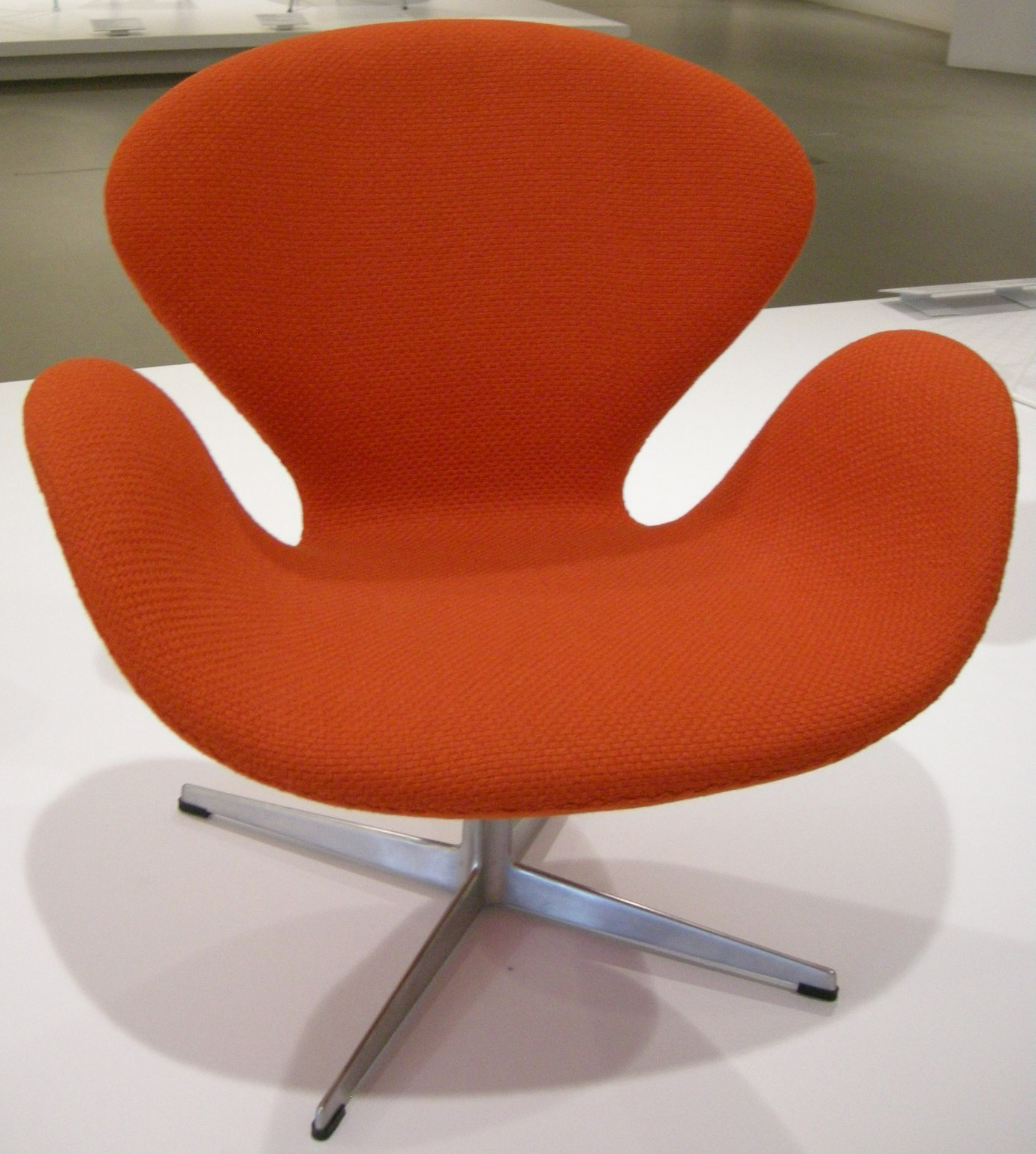 Ngv design, arne jacobsen, swan chair, 1958